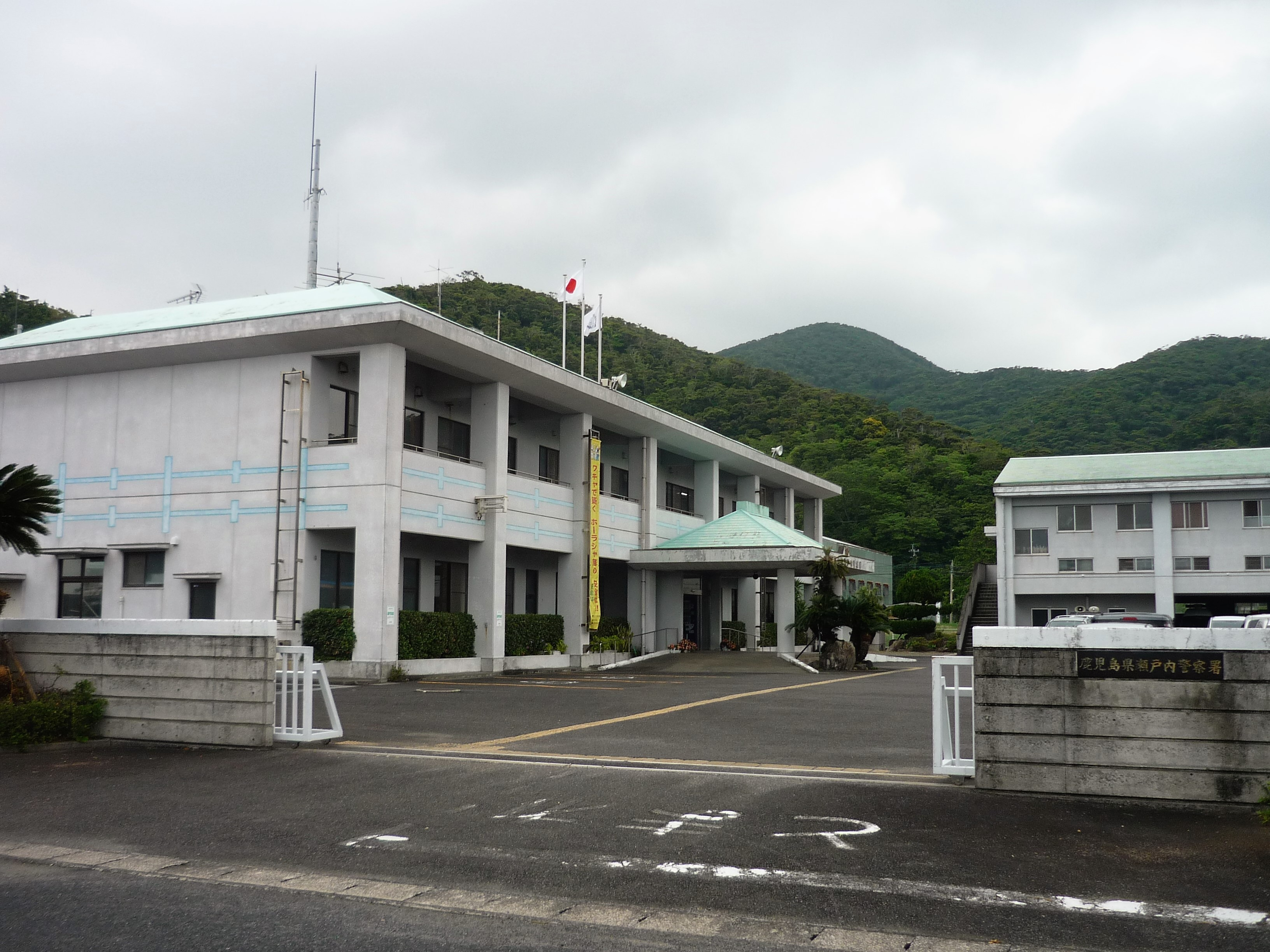 瀬戸内警察署（瀬戸内町古仁屋）